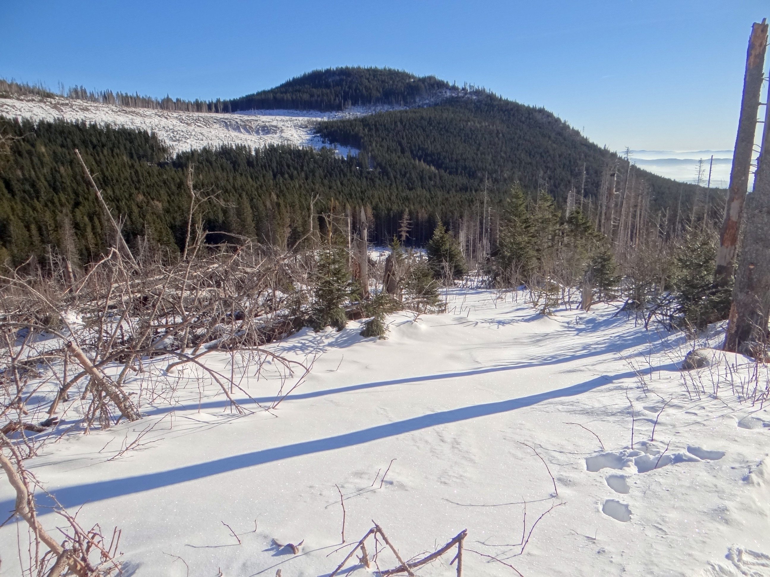 Stežky (Steżki)